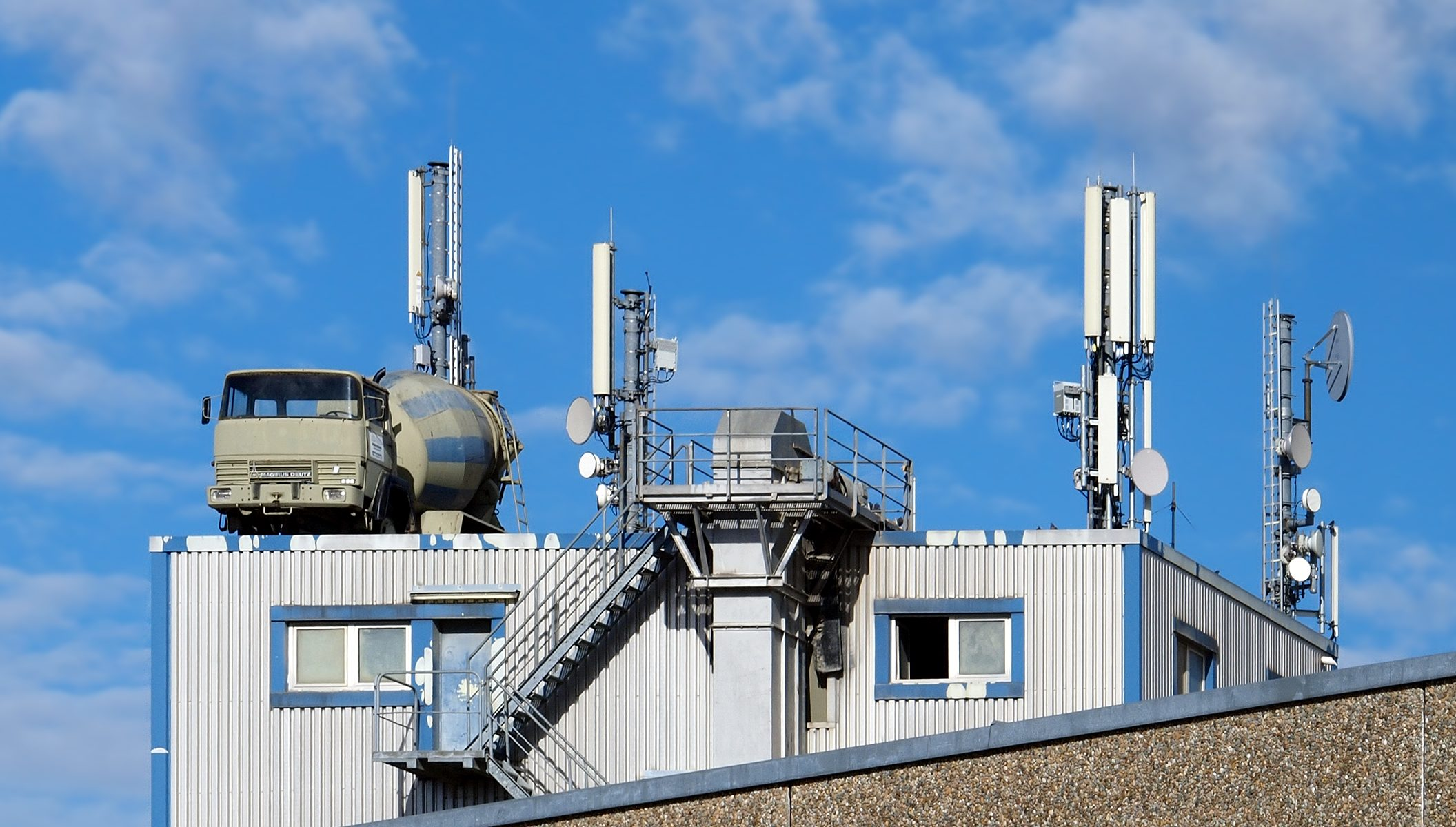 Mobilfunkantennen und ein Betonmischer auf dem Dach von Manzbeton in Bernhausen